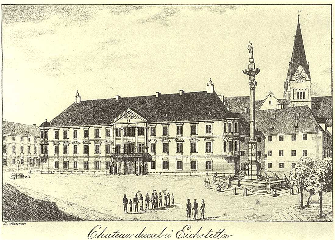 Residenz der Herzöge von Leuchtenberg in Eichstätt. Lithographie von Michael Maurer